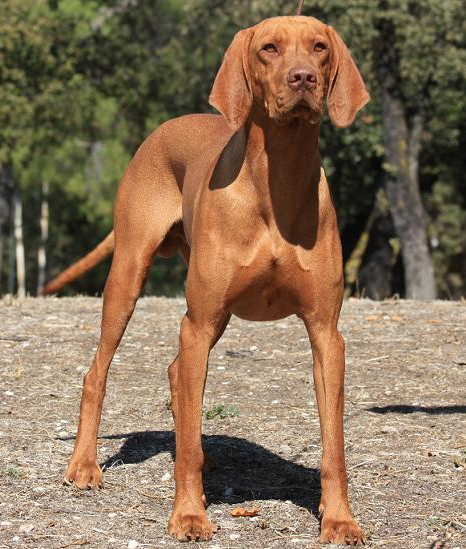 Macho de vizsla Akuma